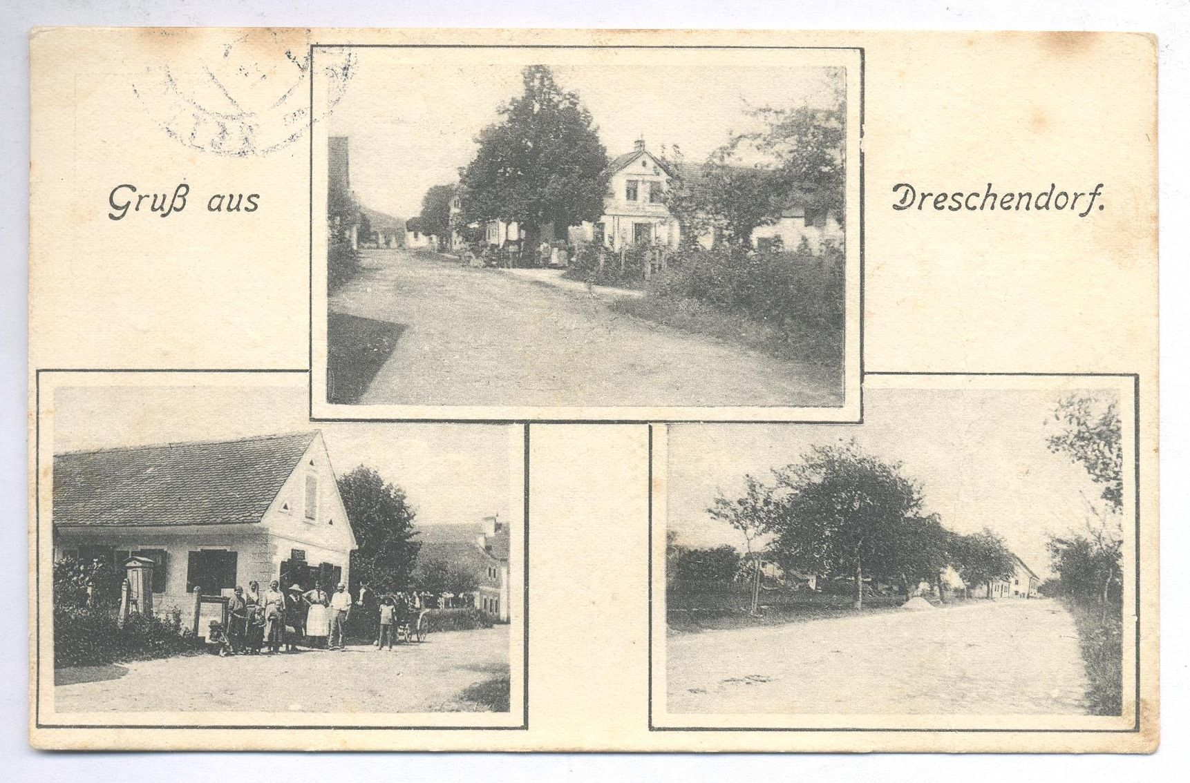 Stara razglednica Petrovč.